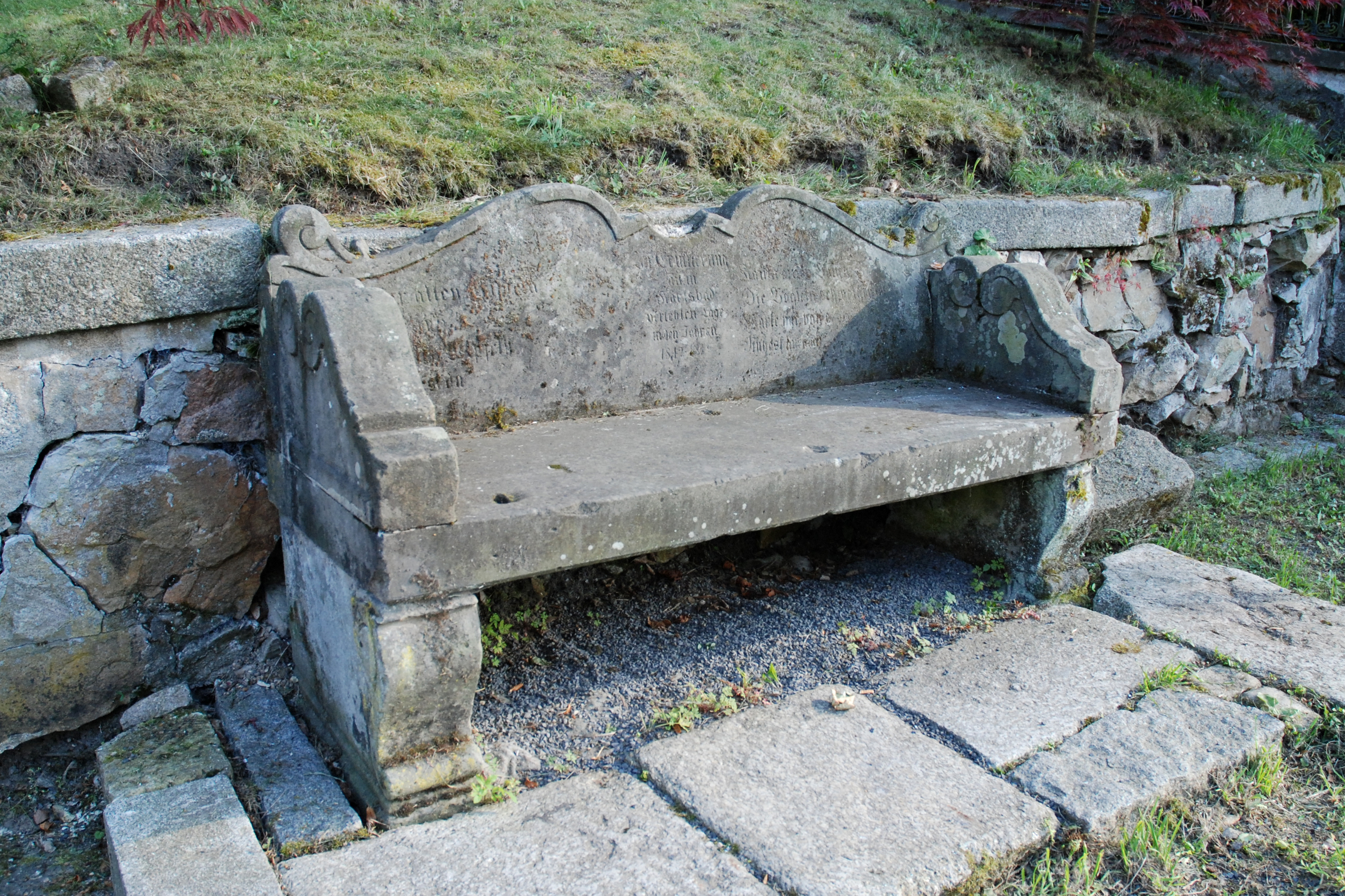 Lavička v Karlových Varech u kostela svatého Lukáše na pravé straně přístupového schodiště